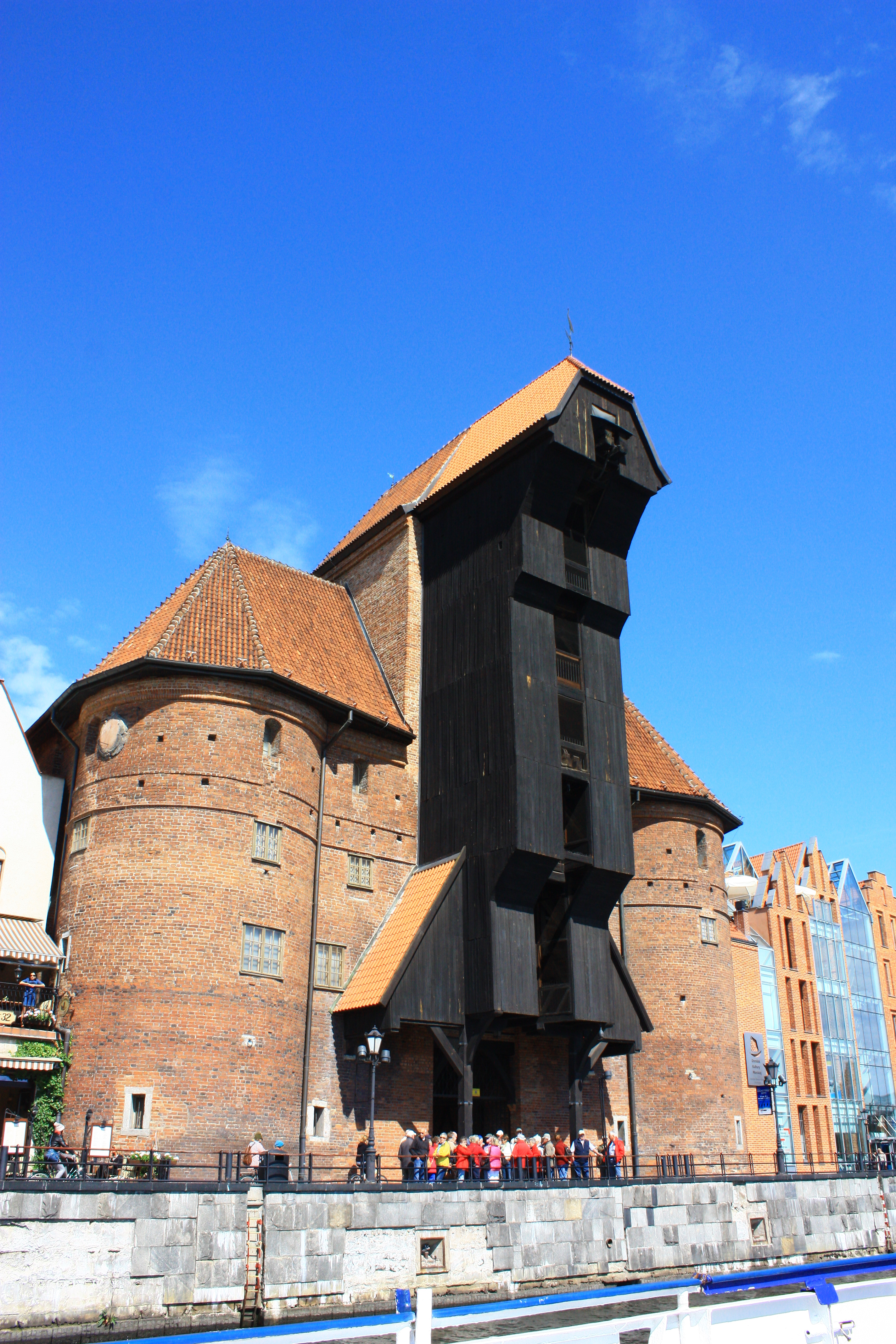 Gdańsk Główne Miasto - Brama Żuraw, XIV, XVII